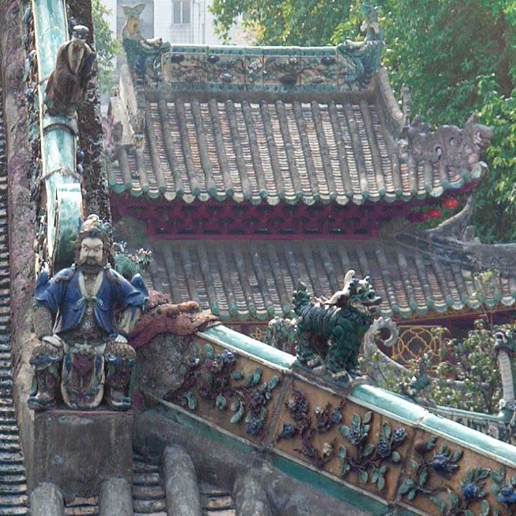 Tejado en el Templo de los Ancestros en Foshan